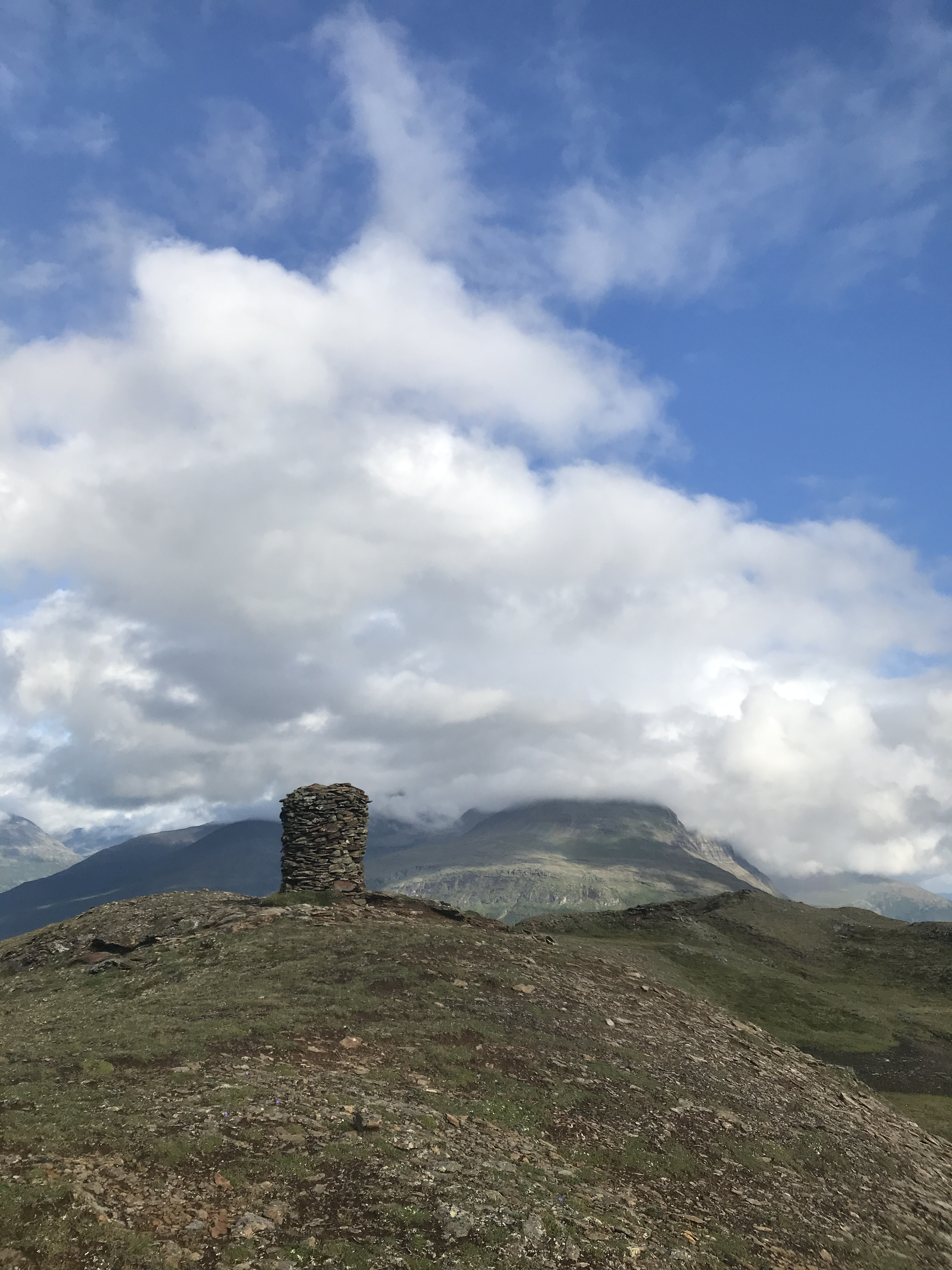 Varden på toppen av Reingjerdfjellet